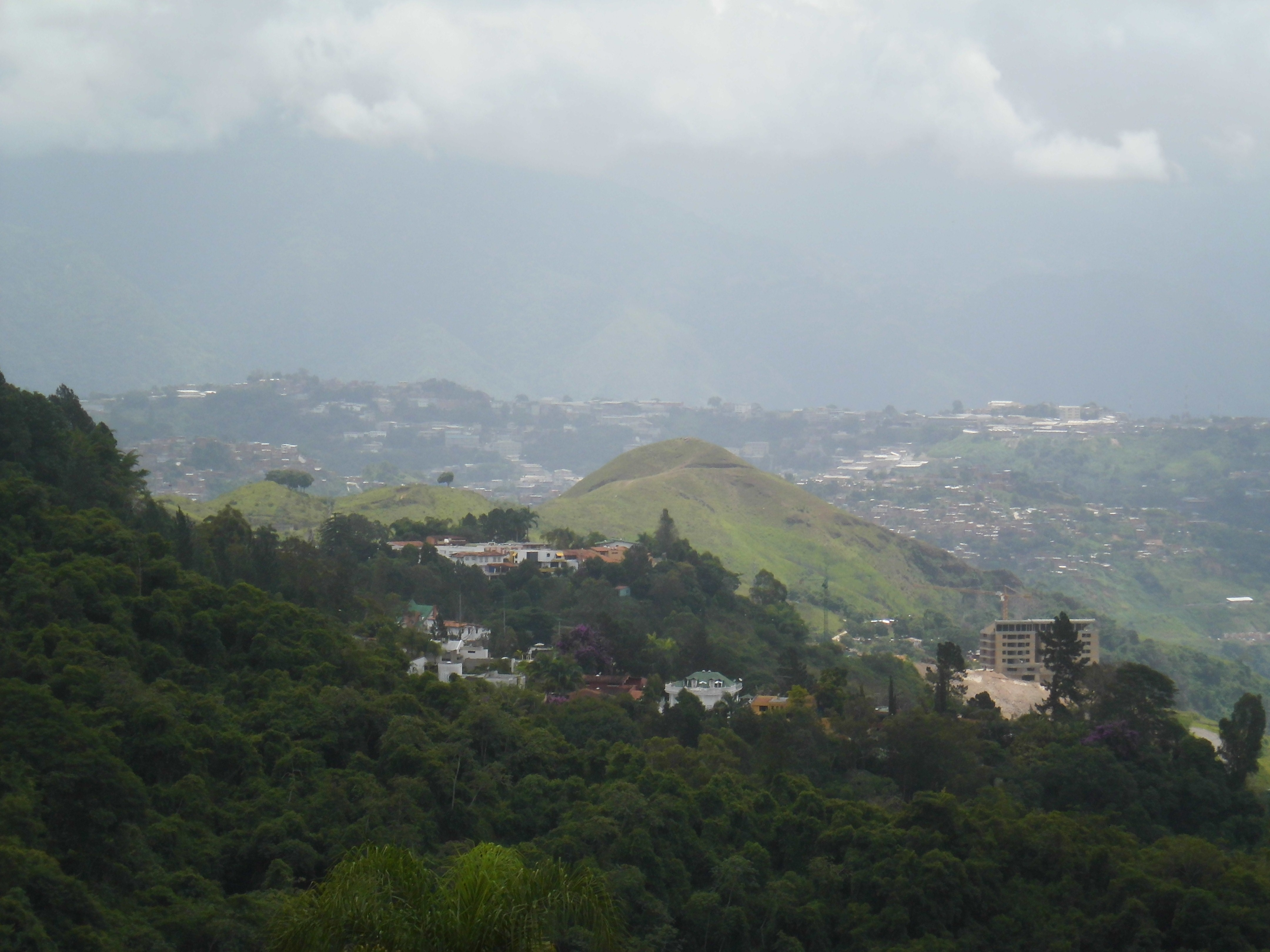 Peñon de Las Guacas al este del municipio El Hatillo, estado Miranda - Venezuela